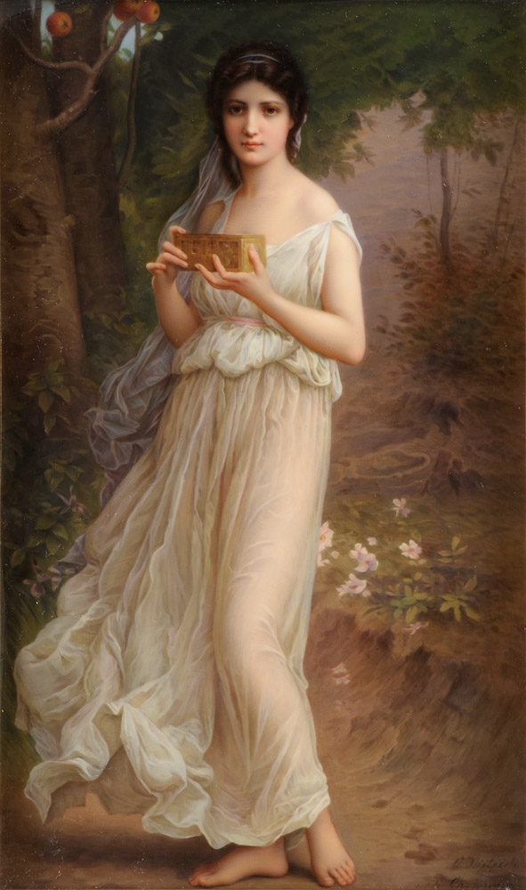 Bildplatte KPM, Pandora. Nach Charles Lenoir. Signiert: O. Dietrich. Zeptermarke und KPM. Beizeichen. 33,5 x 20 cm